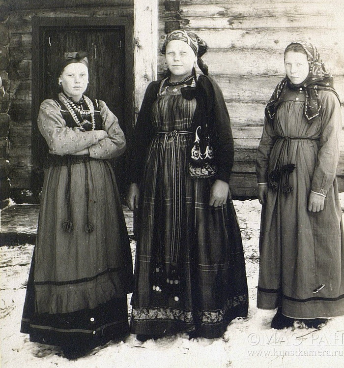 Поморы. Фотография Николая Шабунина 1906 г.